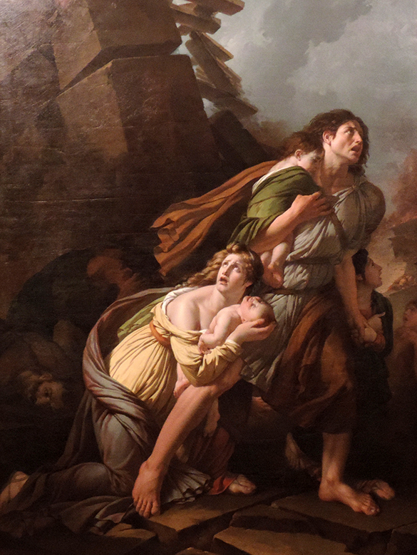 Le Tremblement de terre monumental, 1792-1799 Huile sur toile, 261 x 195 cm Genève, Musées d’art et d’histoire, Inv. 1825-1 Acquis à l’artiste par souscription en 1801 pour le futur musée photo : Bettina Jacot-Descombes